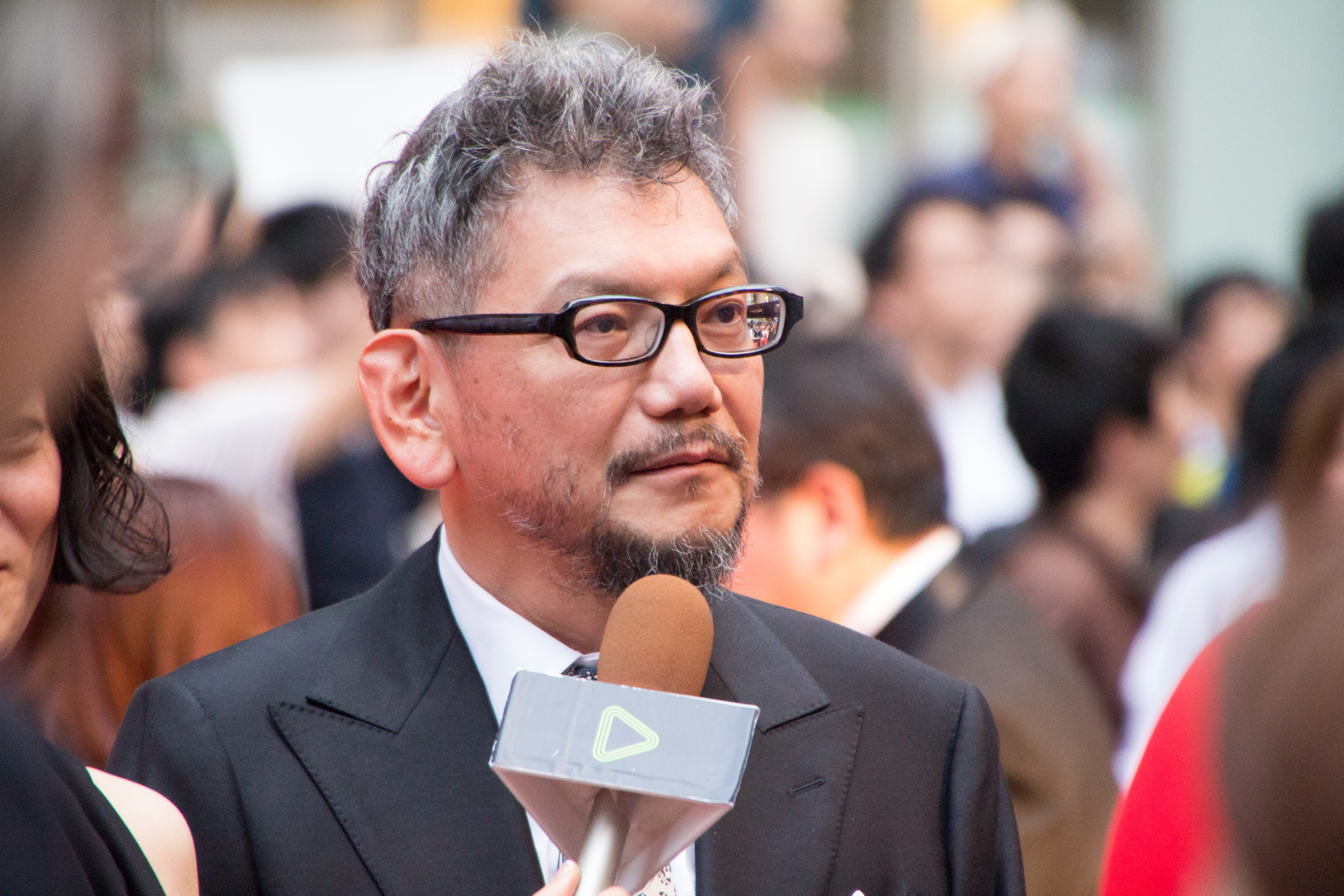 シン・ゴジラ ワールドプレミア レッドカーペットイベント 庵野秀明